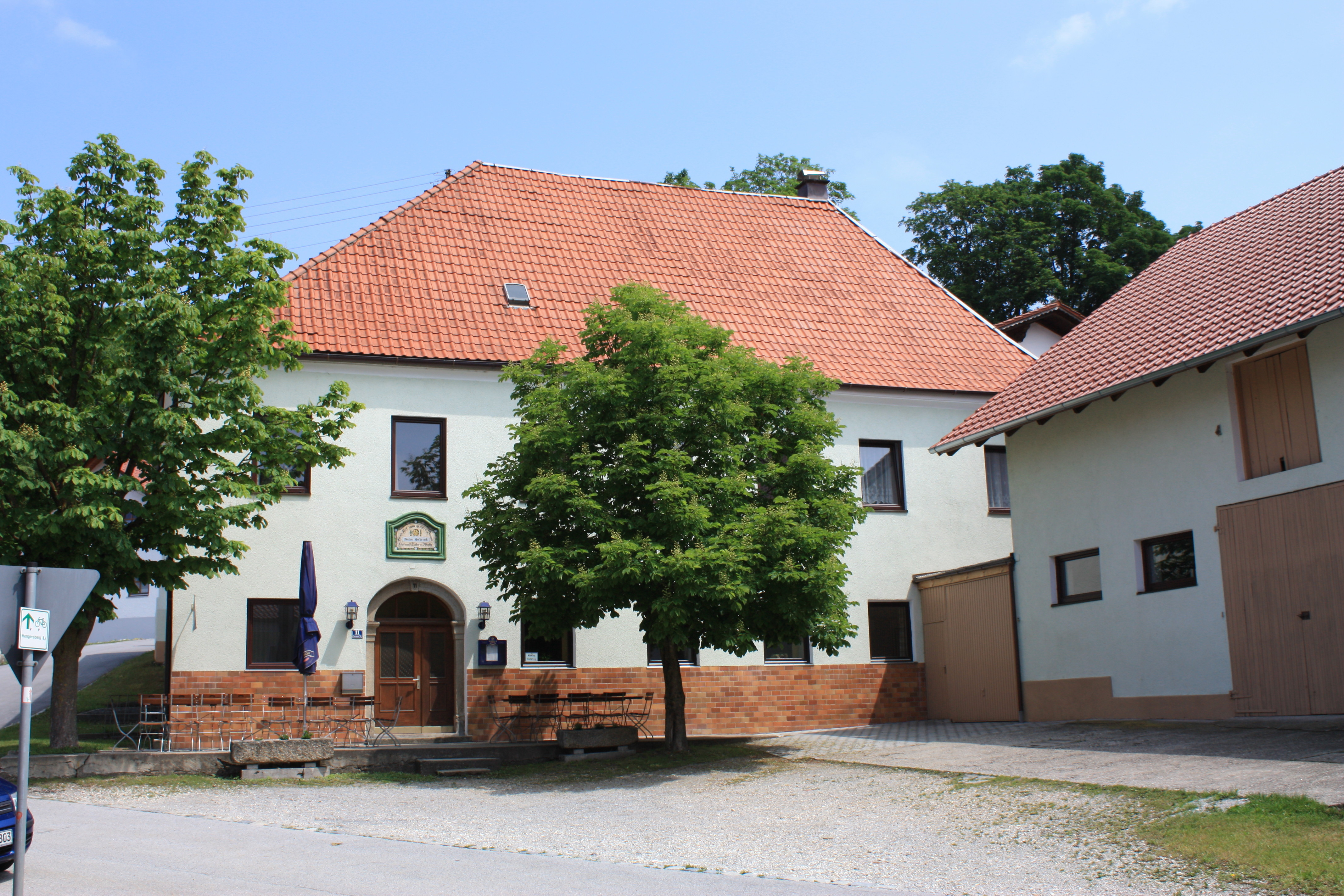 Gasthaus, 18./19. Jh.